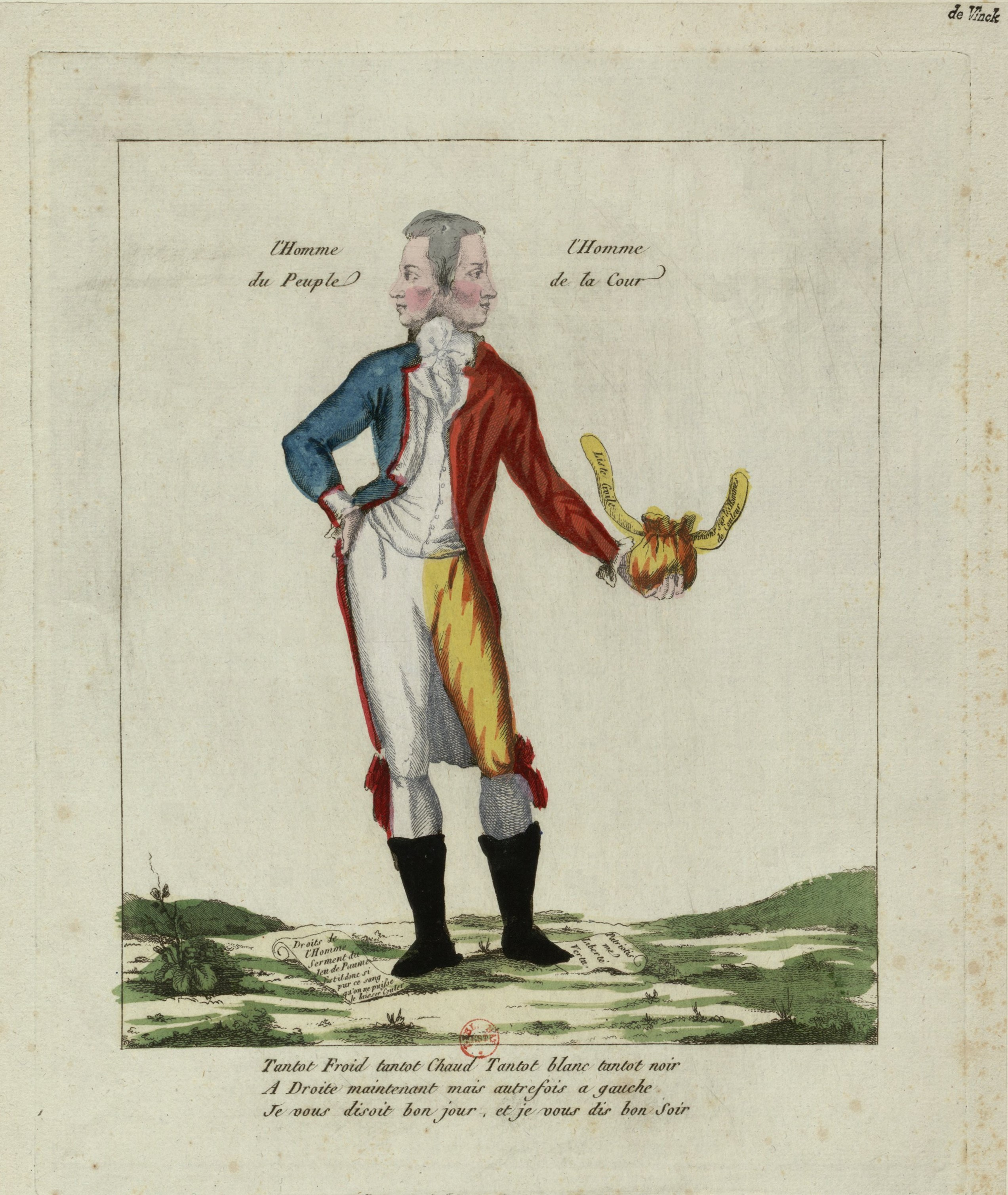 Barnave, Antoine (1761-1793). L'Homme du peuple l'homme de la cour : tantot froid tantot chaud tantot blanc tantot noir a droite maintenant mais autrefois a gauche je vous disoit bonjour, et je vous dis bon soir. Estampe, auteur non identifié.